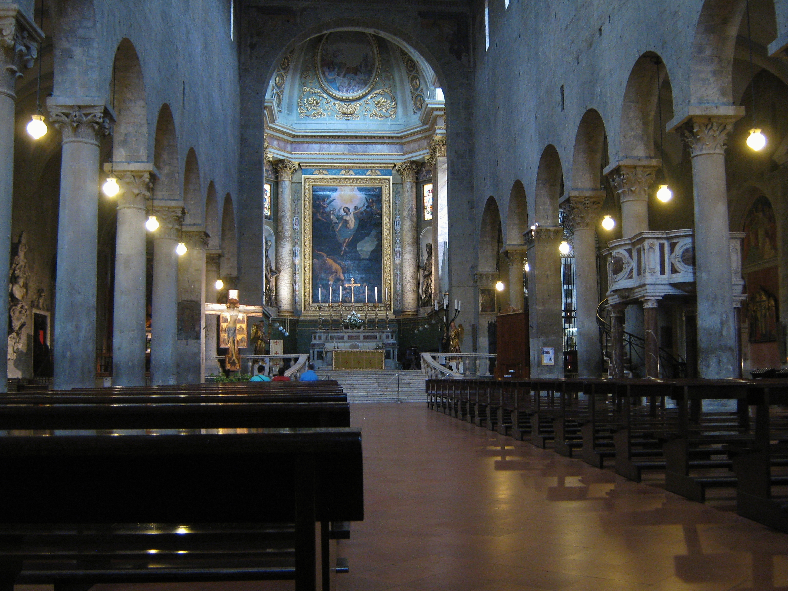 Pistoia: interno del duomo. Veduta verso l'altare maggiore.